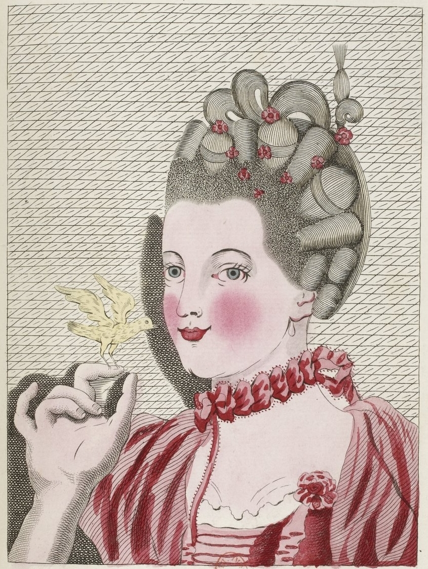 Legros de Rumigny, Coiffure 41: "La quarante-unième Estampe représente une Coëffure à un rang de boucles, & un rang de coques longues barrées, avec une petite mèche de cheveux tirés de la même coque, & un noeud de cheveux fait avec le bout du chignon, & une sultane."